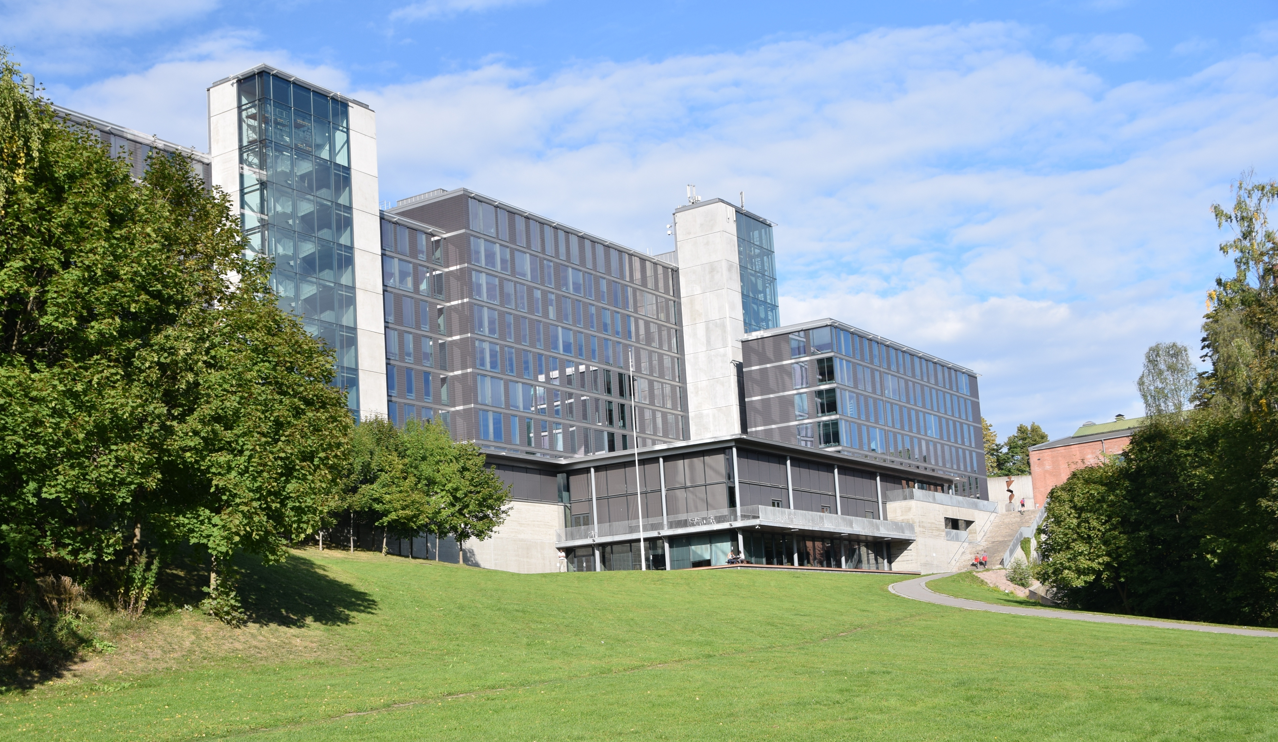 Brynsengfaret 6A, Bryn, Oslo. Statens vegvesens hovedkontor, sett fra grøntområdet langs turveien vest for bygget